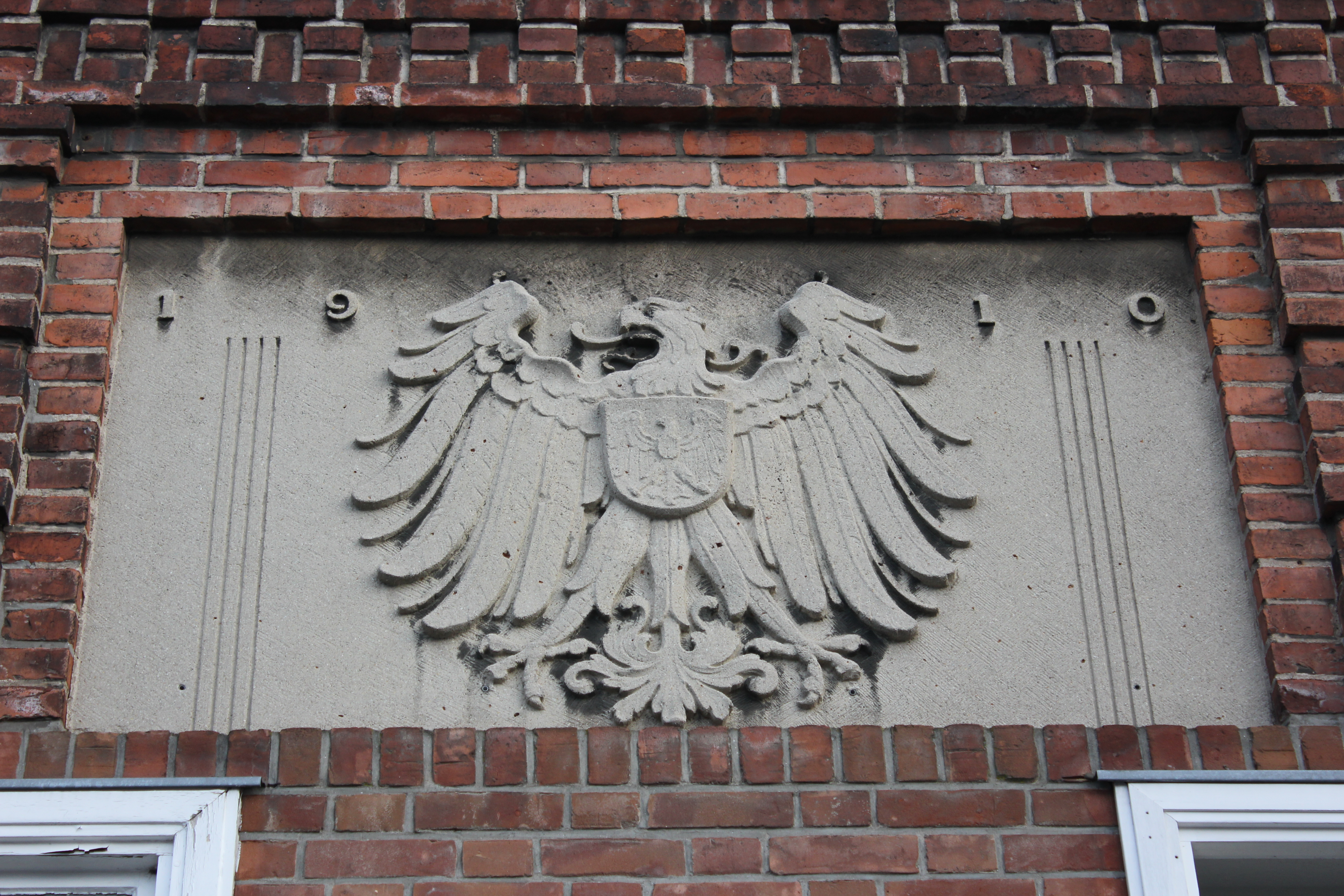 Kaiserliche Post, Deutsches Reichsadler-Relief aus dem Jahr 1910, Bild 02.JPG